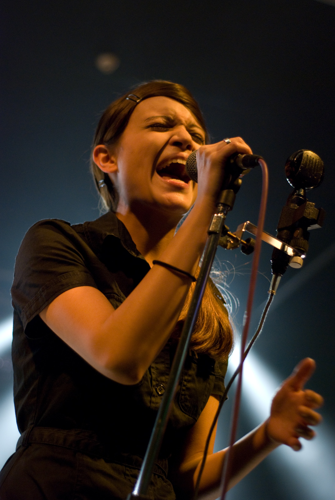 Karpatenhund Live im F-Haus Jena.